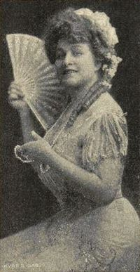 Jennie Norelli (Jenny Norelius. 1863-1942), svenskamerikansk operasångerska